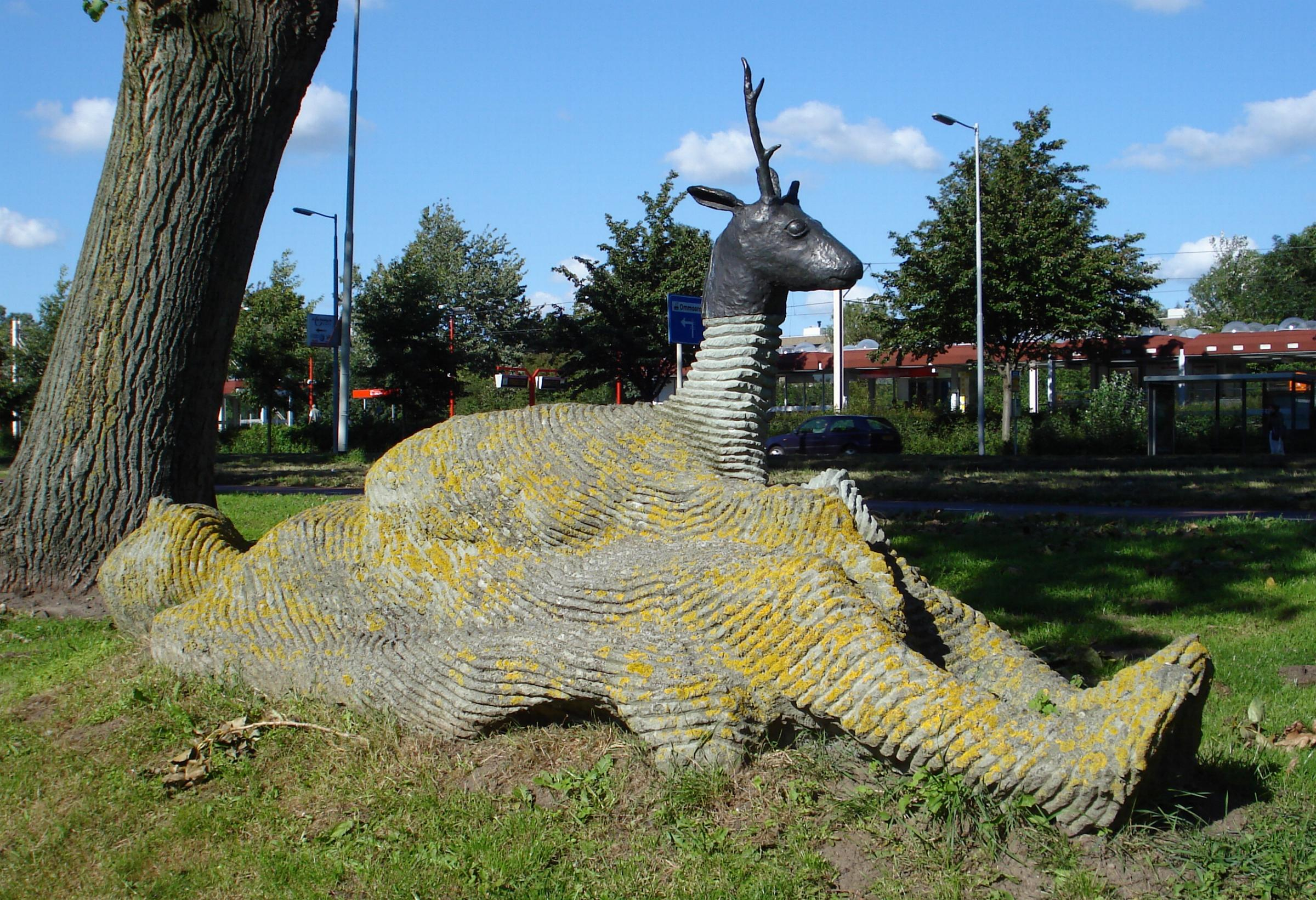 Rotterdam, Ommoord, Prins Alexanderlaan. Kunstwerk "Hert op de reus" van Jeroen Melkert. Rotterdam/The Netherlands.